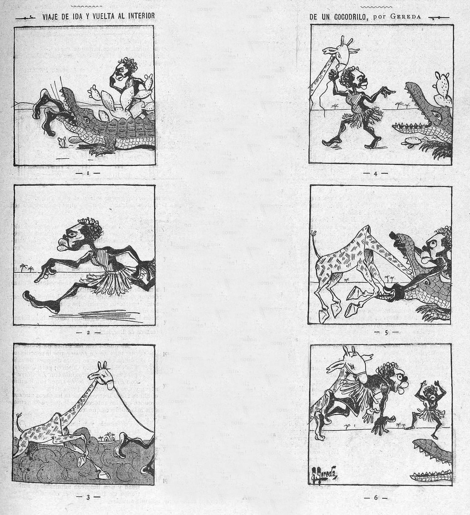 Viaje de ida y vuelta al interior de un cocodrilo.